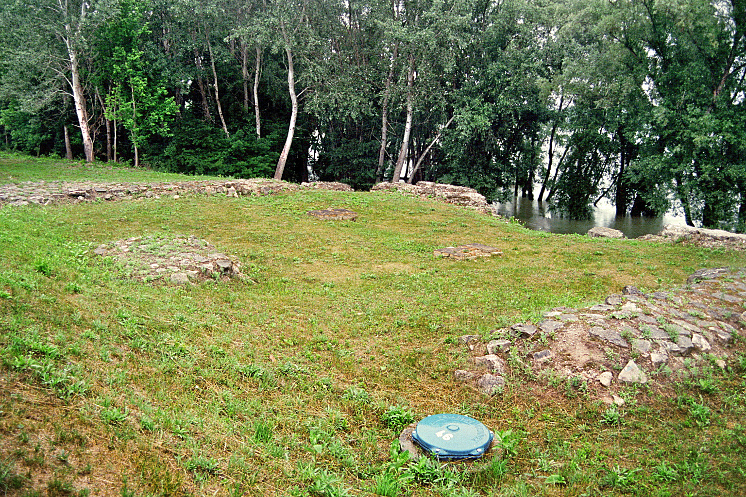 Der Burgus Szigetmonostor-Horány in Ungarn. Blick von Südwesten. Die Aufnahme wurde im strömenden Regen gemacht.